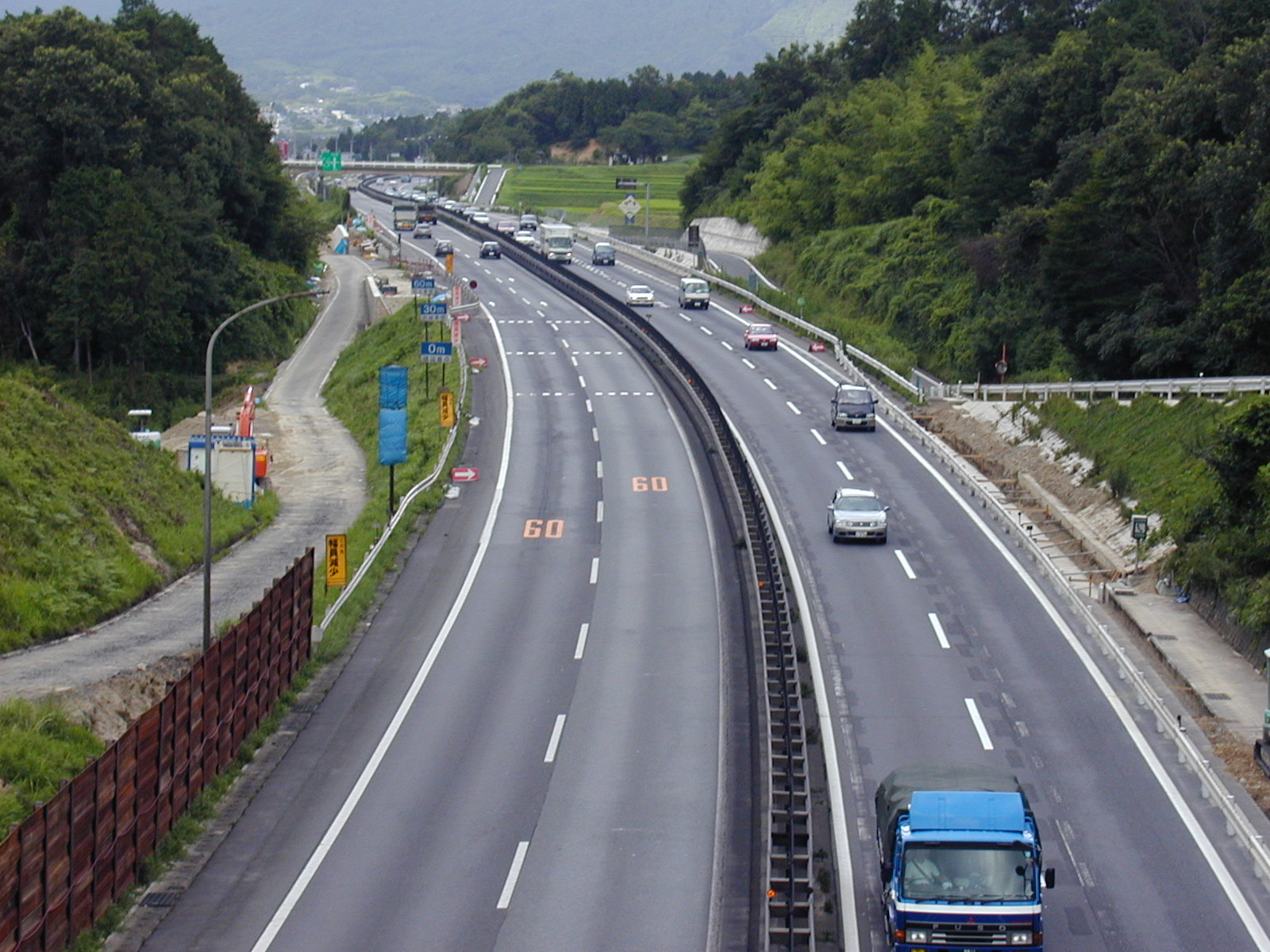 三重県伊賀市の名阪国道上柘植IC付近